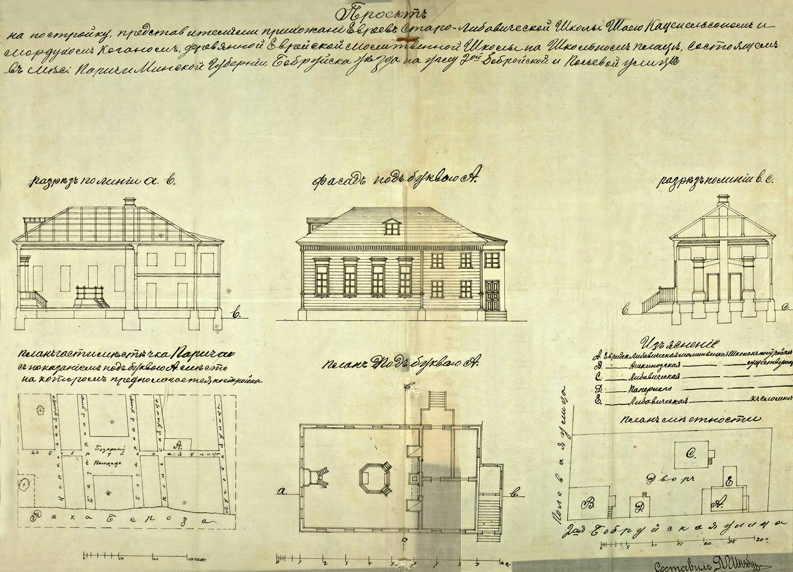 Беларуская (тарашкевіца): Парычы (Paryčy), вуліца 2-я Бабруйская (vulica II Babrujskaja). Праект Стара-Любавіцкай школы